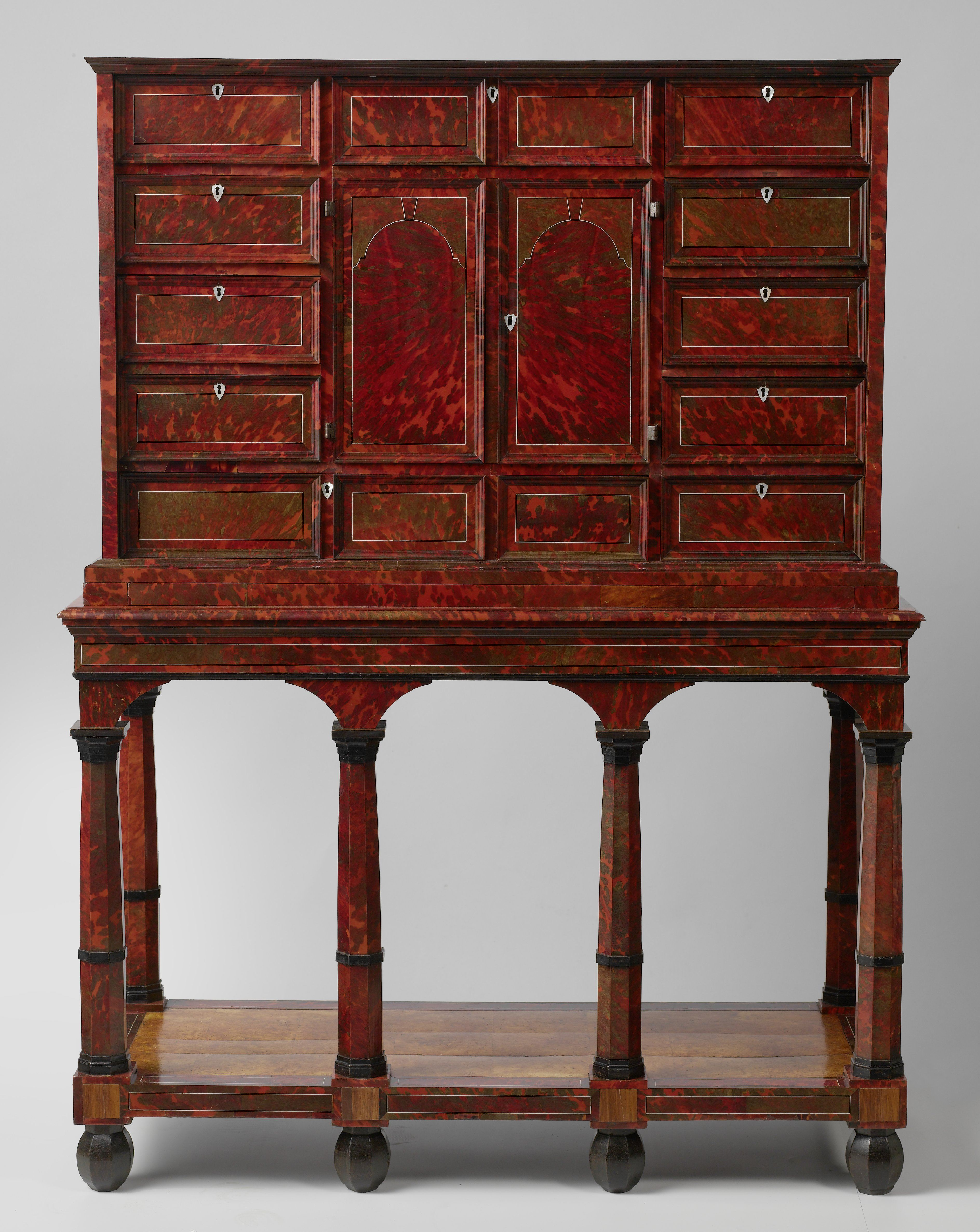 IdentificatieTitel(s): KabinetKunstkast, belijmd met schildpad op rode onderlaag. Ter weerszijden van de twee deuren bevinden zich boven en onder elf laden. Achter de deuren nog eens tien laden om een met spiegels beklede, door Toscaanse zuilen gelede ruimte met een met schildpad en ivoor belijmde vloerObjecttype: meubilair kast kunstkast Objectnummer: BK-NM-5669Omschrijving: Kunstkabinet belijmd met schildpad op een rode onderlaag op een eiken kern. In het midden twee deurtjes. Aan weerszijden hiervan, boven en onder elf laden. Achter de deurtjes tien laadjes om een met spiegels beklede, door Toscaanse zuiltjes gelede ruimte met een vloertje, belijmd met schildpad en ivoor. Deze laadjes zijn van eike- en notenhout, het voorbord belegd met rozehout. De deuren dragen aan de binnenzijde spiegels. Het meubel staat op een onderstel met zes kolompoten en een vloer van ambonwortelhout.VervaardigingVervaardiger: meubelmaker: anoniemPlaats vervaardiging: AntwerpenDatering: ca. 1655 - ca. 1660Fysieke kenmerken: naald- en eikenhout, belijmd met schildpad en been; beslag: zilverMateriaal: hout eikenhout ebbenhout notenhout naaldhout rozenhout amboinahout schildpad ivoor glas been zilver Afmetingen: h 149,5 cm. × b 101,0 cm. × d 48,0 cm. grondvlak: b 101,0 cm. × d 48,0 cm. Verwerving en rechtenVerwerving: aankoop 1882Copyright: Publiek domein